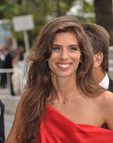 Maïwenn Le Besco au festival de Cannes